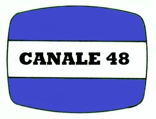 uno dei primi stikers di canale 48